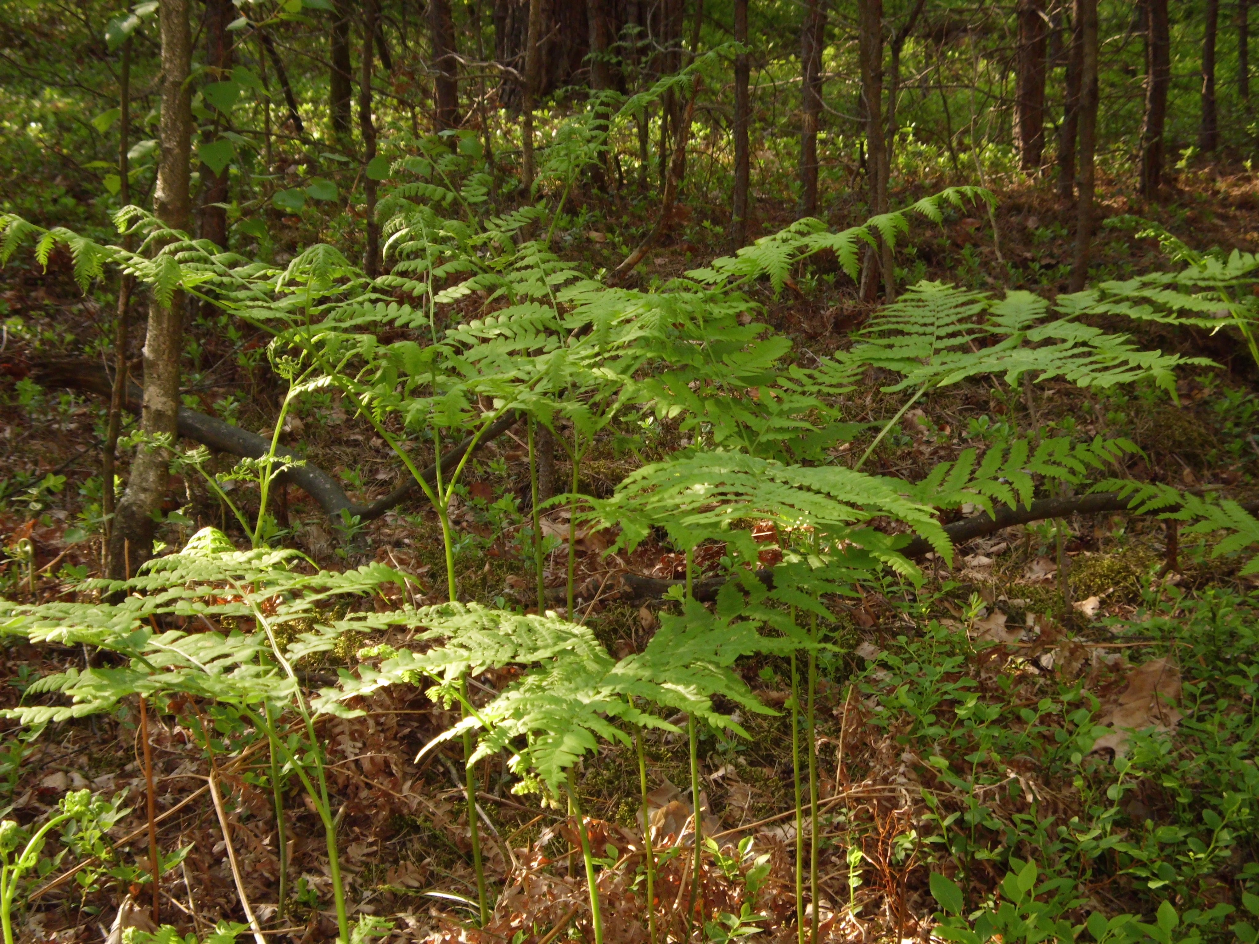 Paproć